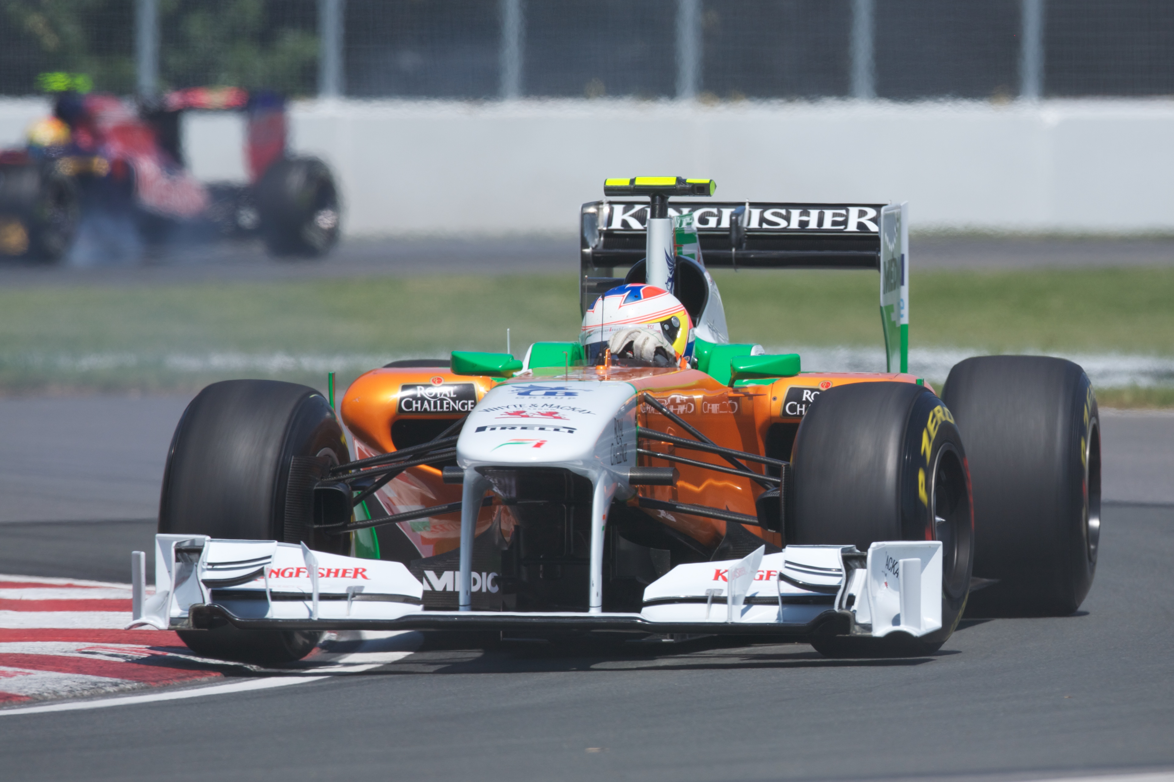 Paul di resta au GP du canada 2011